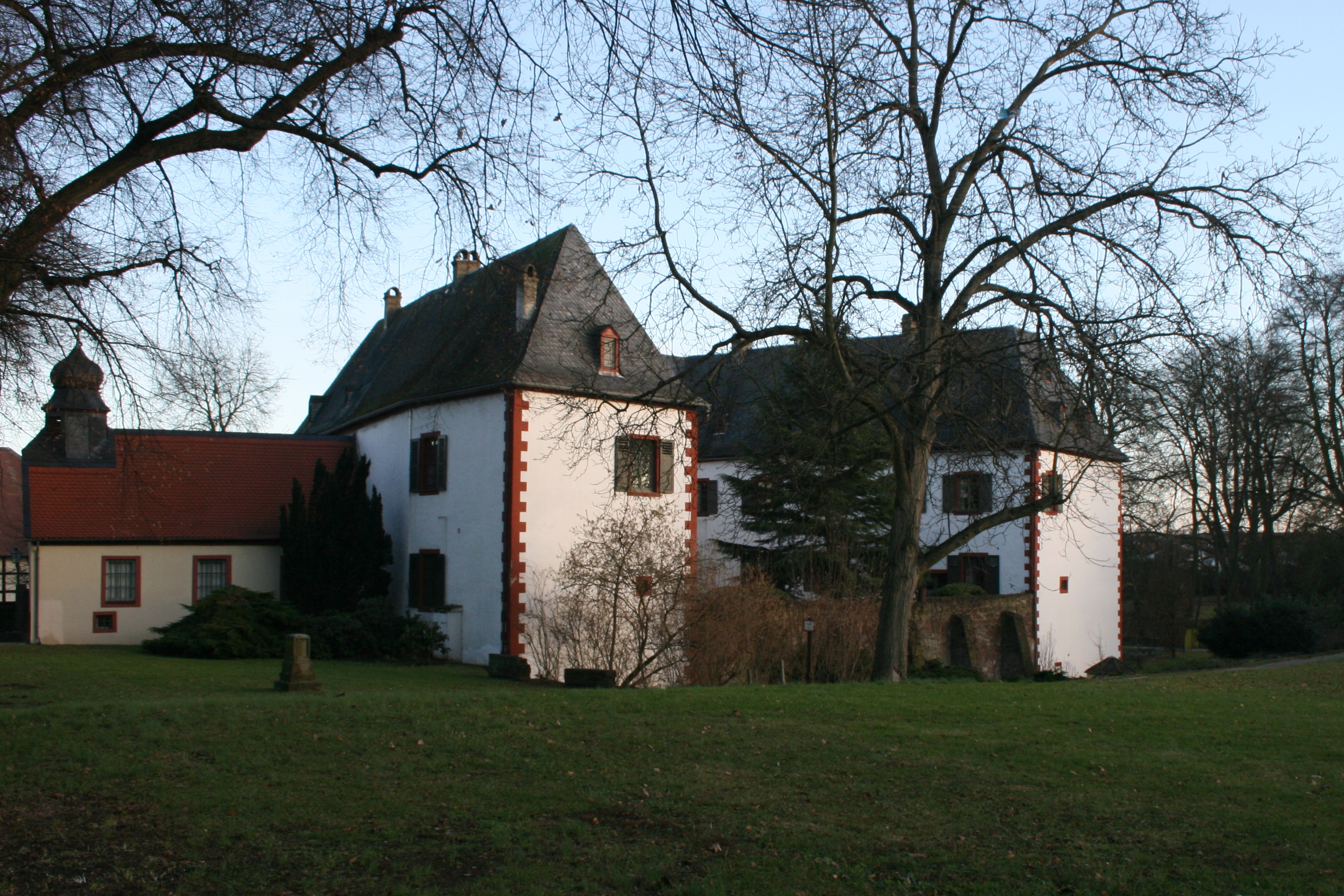 Oberburg Heldenbergen, Ansicht von Nordwesten. Ahnherr Johann Peter von Leonhardi (1747–1830), Frankfurter Bankier, Kaufmann, Politiker und Freimaurer. Ursprünglich stammt seine Familie Leonhard aus Waldeck und nannte sich später Leonhardi´. Er war die 2.Generation in Frankfurt. Er wurde als angesehener Bankier und Ratsherr der Stadt 1794 von Kaiser Leopold II, dem Sohn Kaiserin Maria Theresias, in dessen letztem Regierungsjahr in den Reichsgrafenstand erhoben. 1806 Bauherr der Villa Leonhardi in Frankfurt Westend; Käufer des sog. Leonhardischen Schlosses in Groß-Karben, das heute noch, wie die Oberburg, im Familienbesitz ist. 1886 Kauf der Oberburg durch Fritz von Leonhardi, Großherzoglicher Kammerherr, zunächst als Sommer- und Jagdhaus.